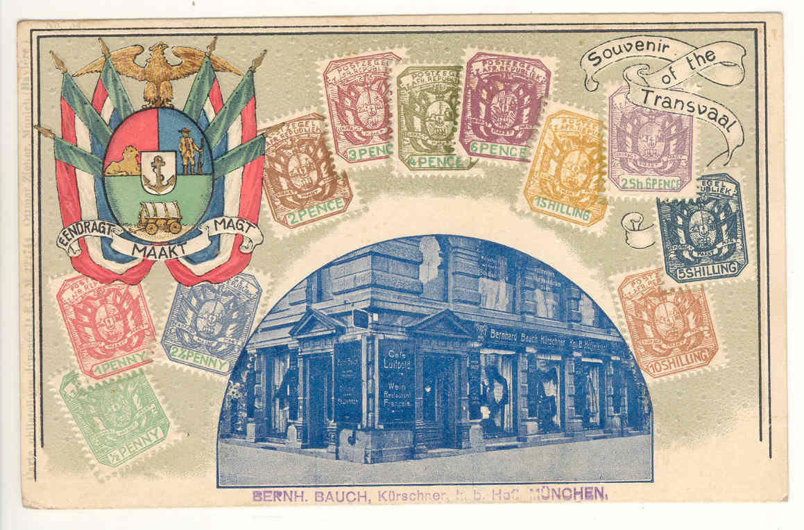 Souvenir of the Transvaal - Eendracht maakt magd. Postkarte, gelaufen 10. August 1900 (Poststempel schlecht zu lesen). Café Luitpold Kürschner Bernhard Bauch, Kgl. B. Hoflieferant. Brienner Straße 8.